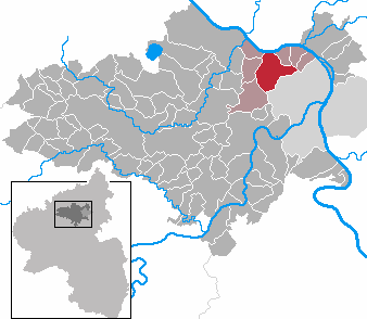 Mülheim-Kärlich in Rhineland-Palatinate - district Mayen-Koblenz